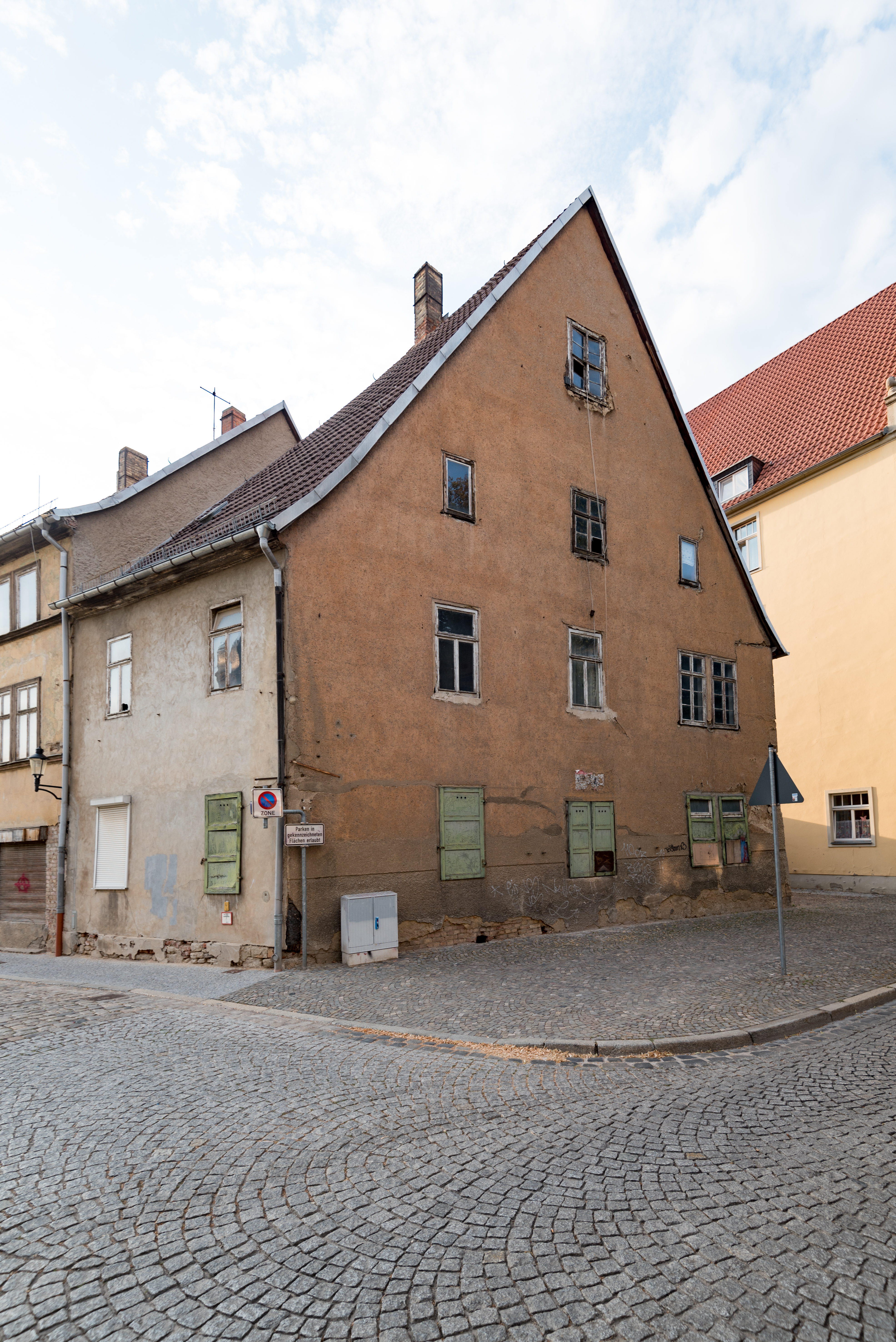 Naumburg (Saale), Lindenring 46